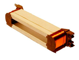 Papierisolierte steckbare Einzelzahnspule mit Kunststoffendkappen und integrierten Schneid- Klemmkontakttaschen